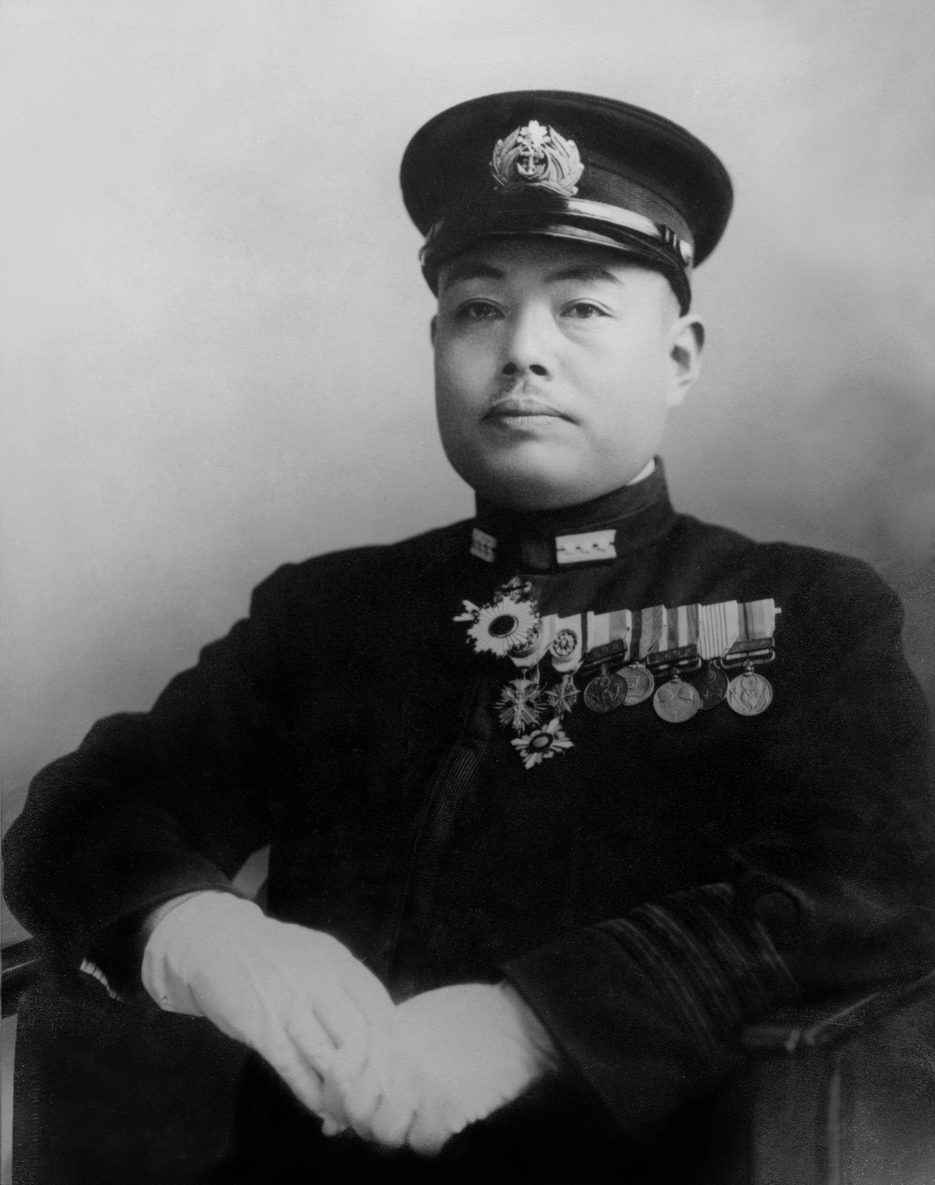 本人の写真